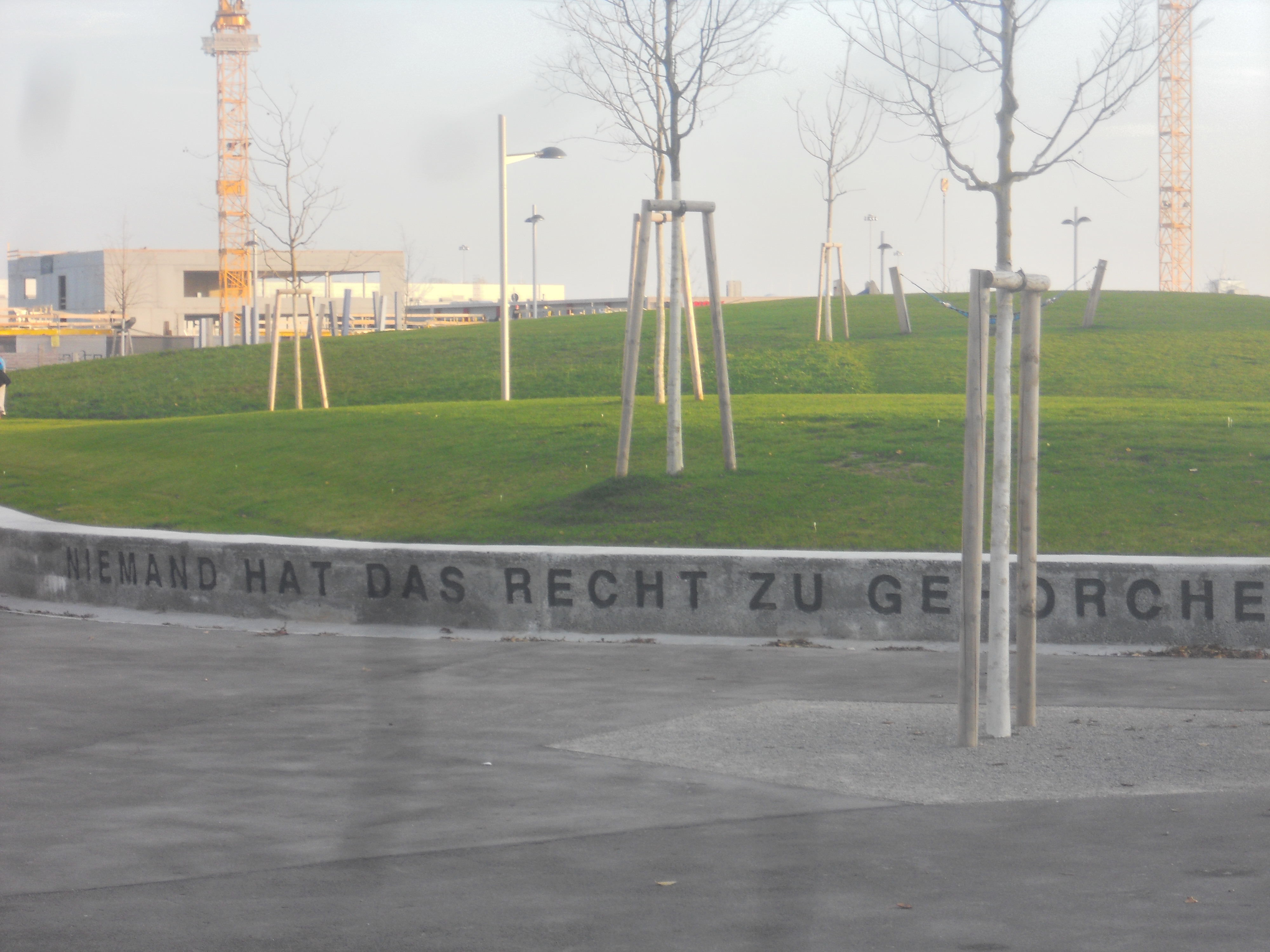 Der im Mai 2015 eröffnete Hannah-Arendt-Park in der Seestadt Aspern